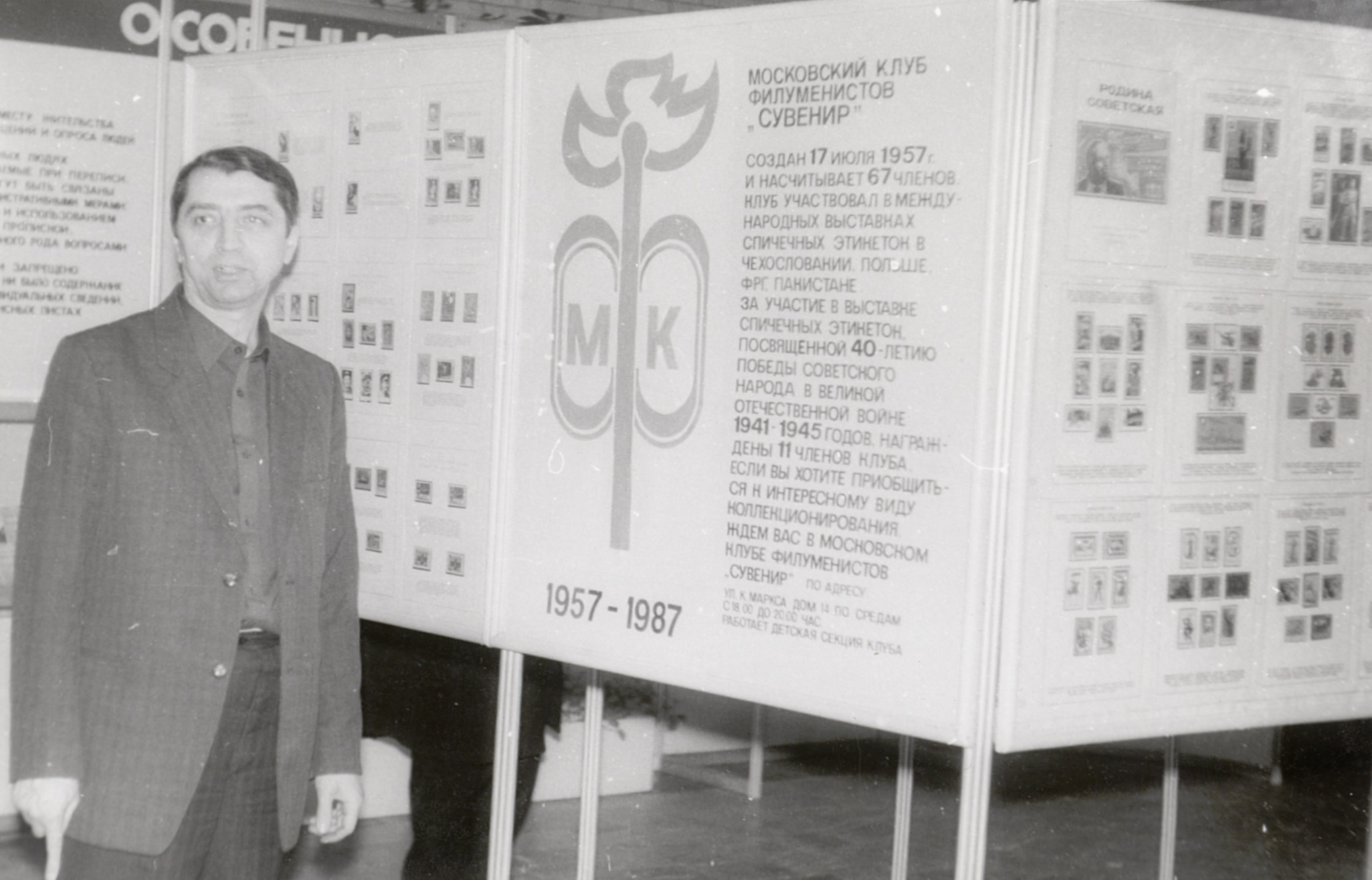 Выставка филуменистов 1987 год. Из личного архива Дюпина Роберта Сергеевича (Почетный президент клуба).